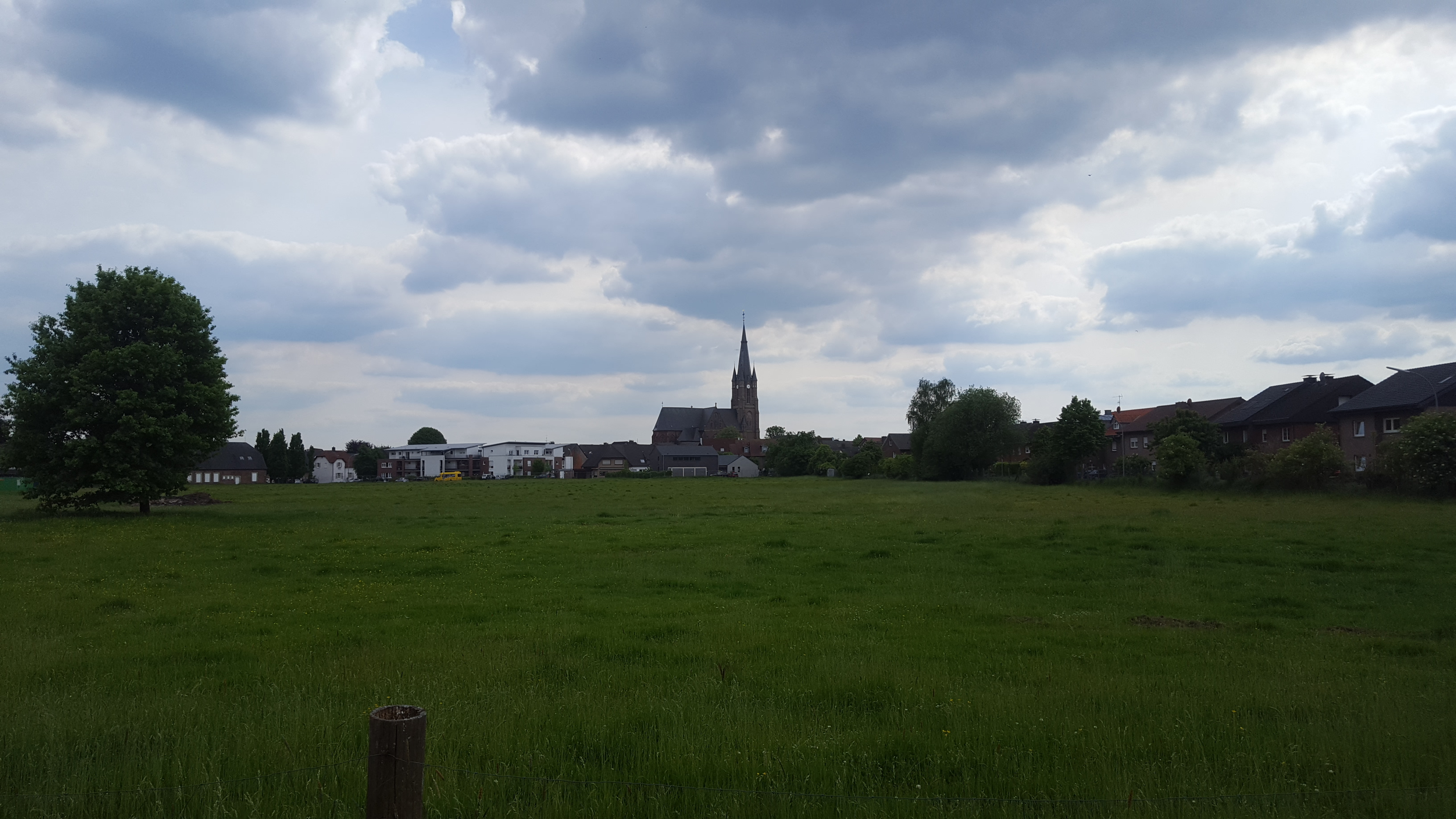 View on Weseke/Borken/Germany